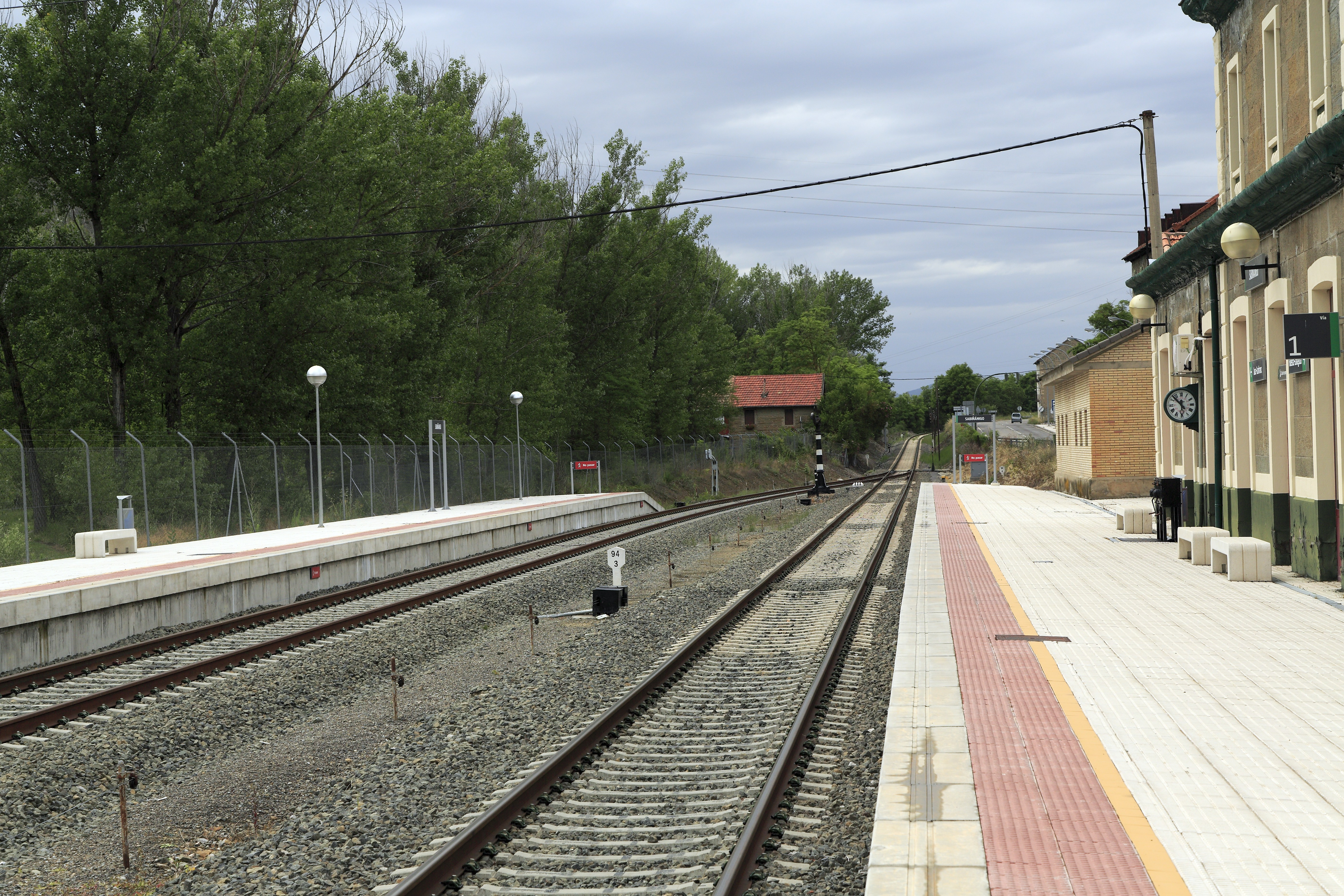 Ausfahrsignale und damit Streckenblock wurde nicht eingebaut, der umspurbare Oberbau W mit schweren Schienen ist für die Wiederaufnahme des grenzüberschreitenden Verkehres durch den Somoporttunnel vorbereitet.